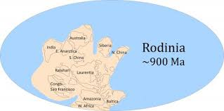 rodinya kıtasının oluşumu